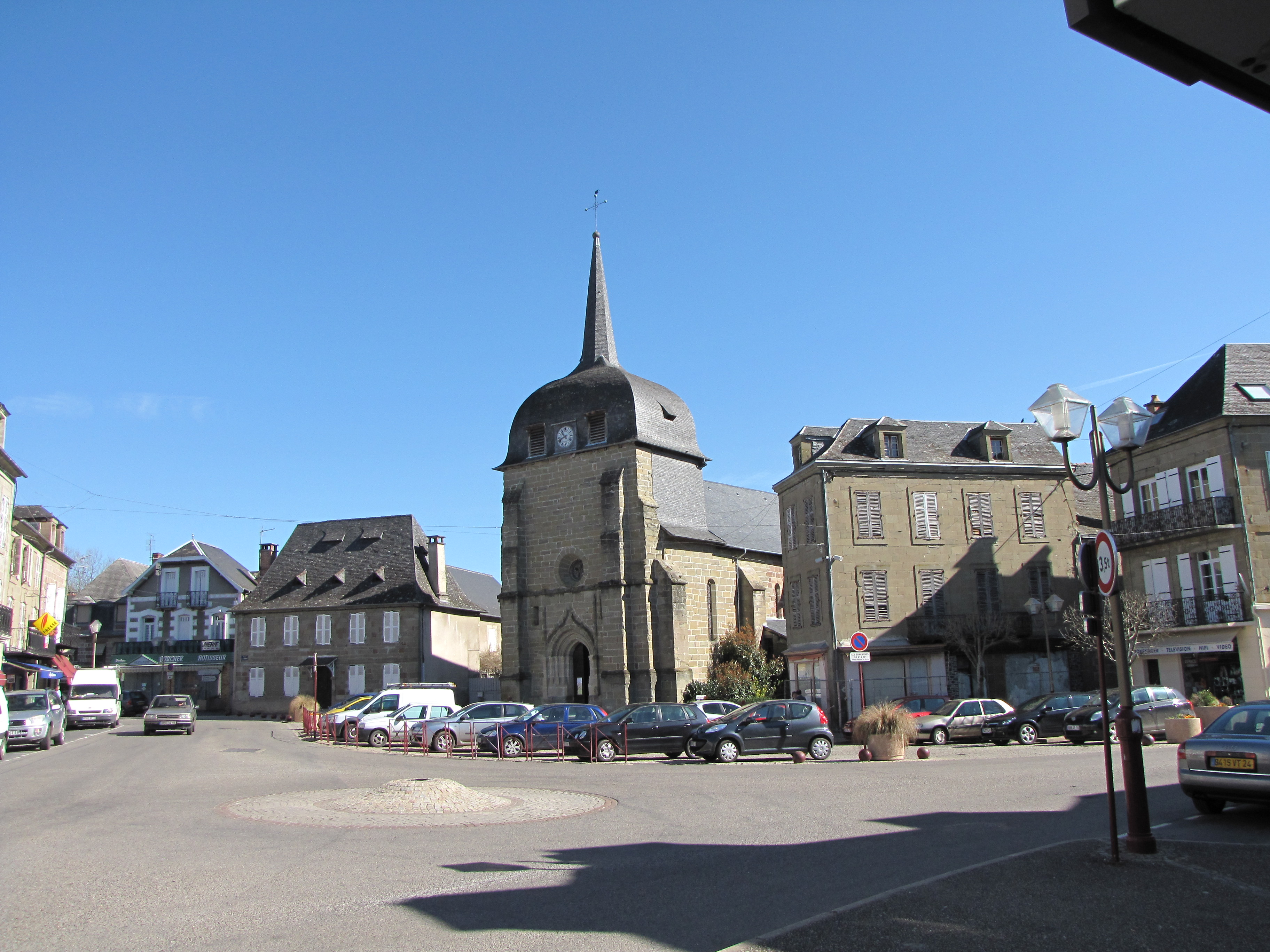 Église d'Objat